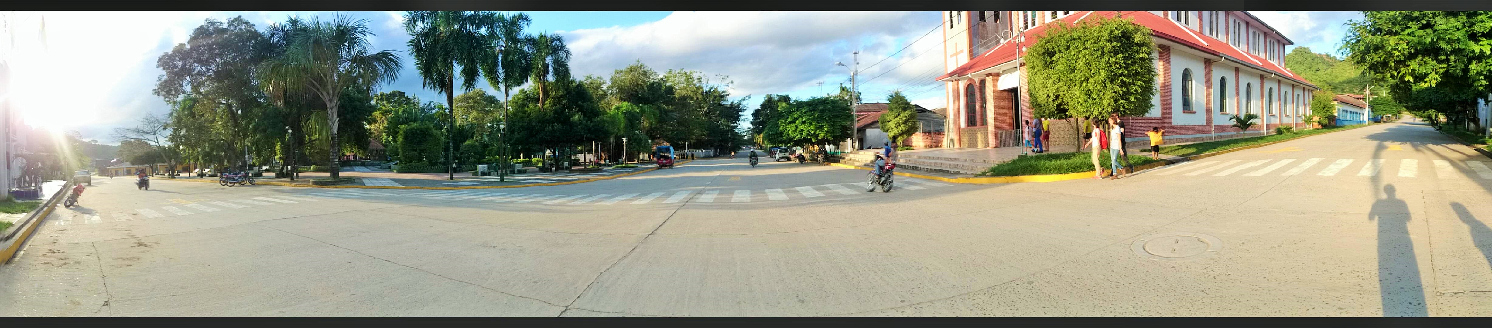 Rurrenabaque Plaza 2 de Febrero e Eglesia